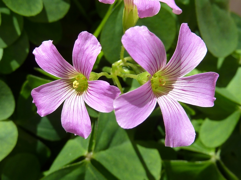 Oxalis debilis var. corymbosa (Agricos) : Flores - Ornamental, Albatera (Alicante, España).